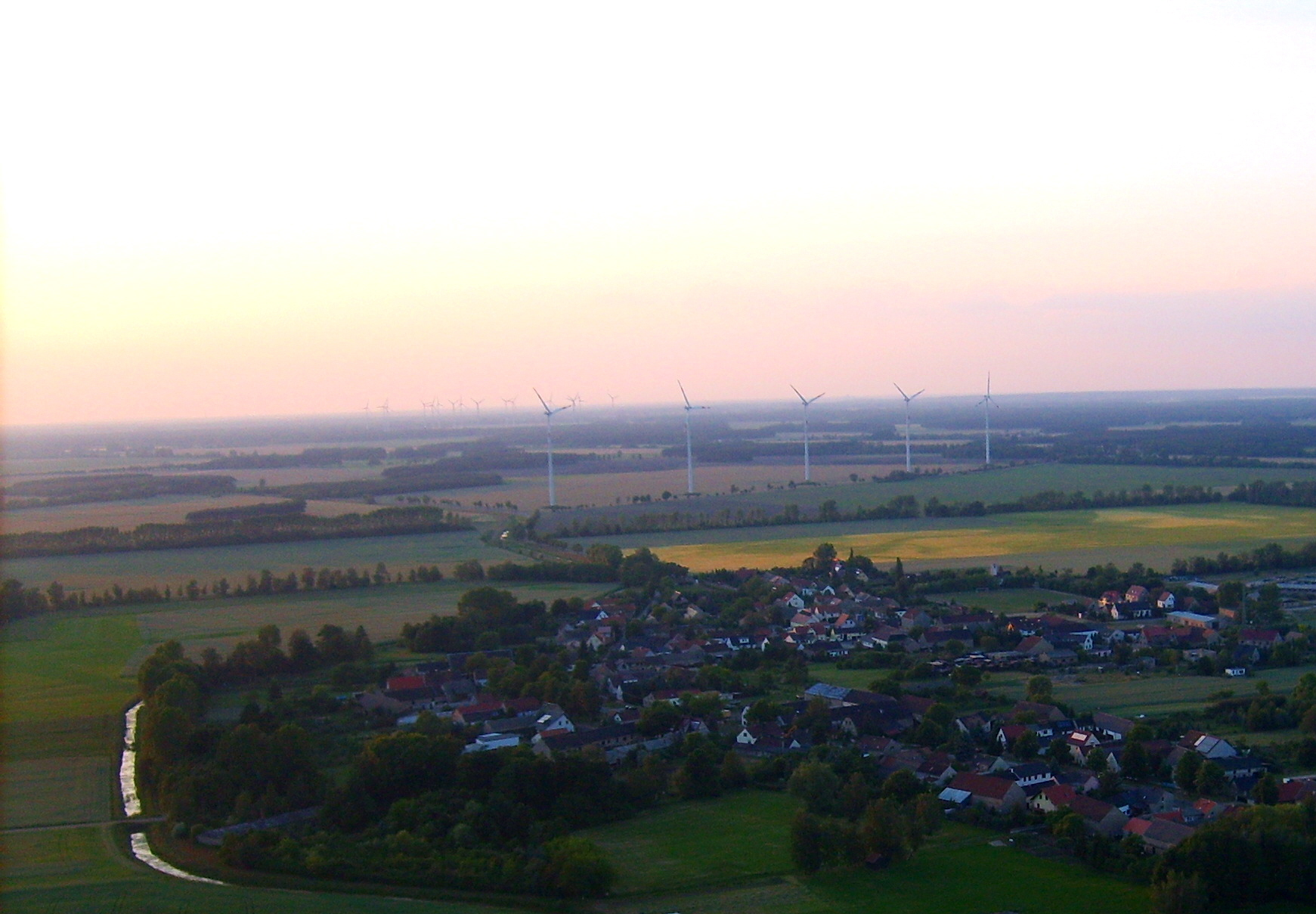 Lausitz von Osten betrachtet.